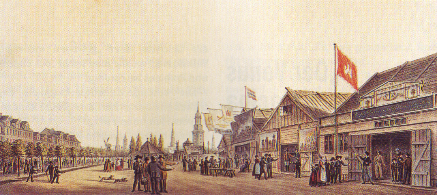 Der Spielbudenplatz in St. Pauli mit den namengebenden Holzbuden im Jahre 1800. Zeitgenössische Darstellung.